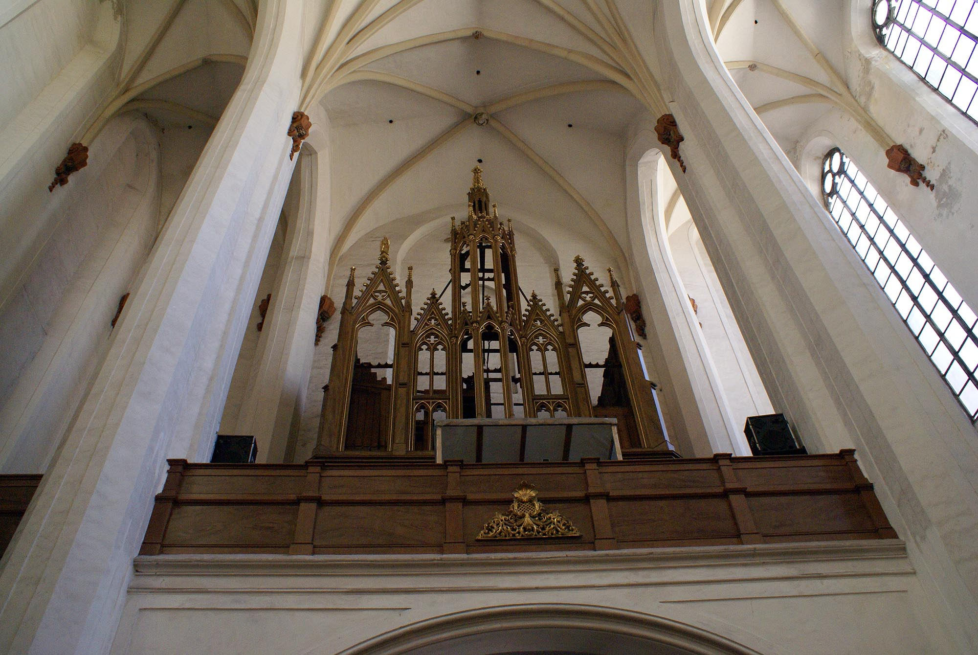 Wrocław, kościół klasztorny augustianów eremitów, ob. par. p.w. śś. Wacława, Doroty i Stani…, 1351-1381, ok. 1400, 3 ćw. XV, 1720-1730, 1892-1899, 1927-1936